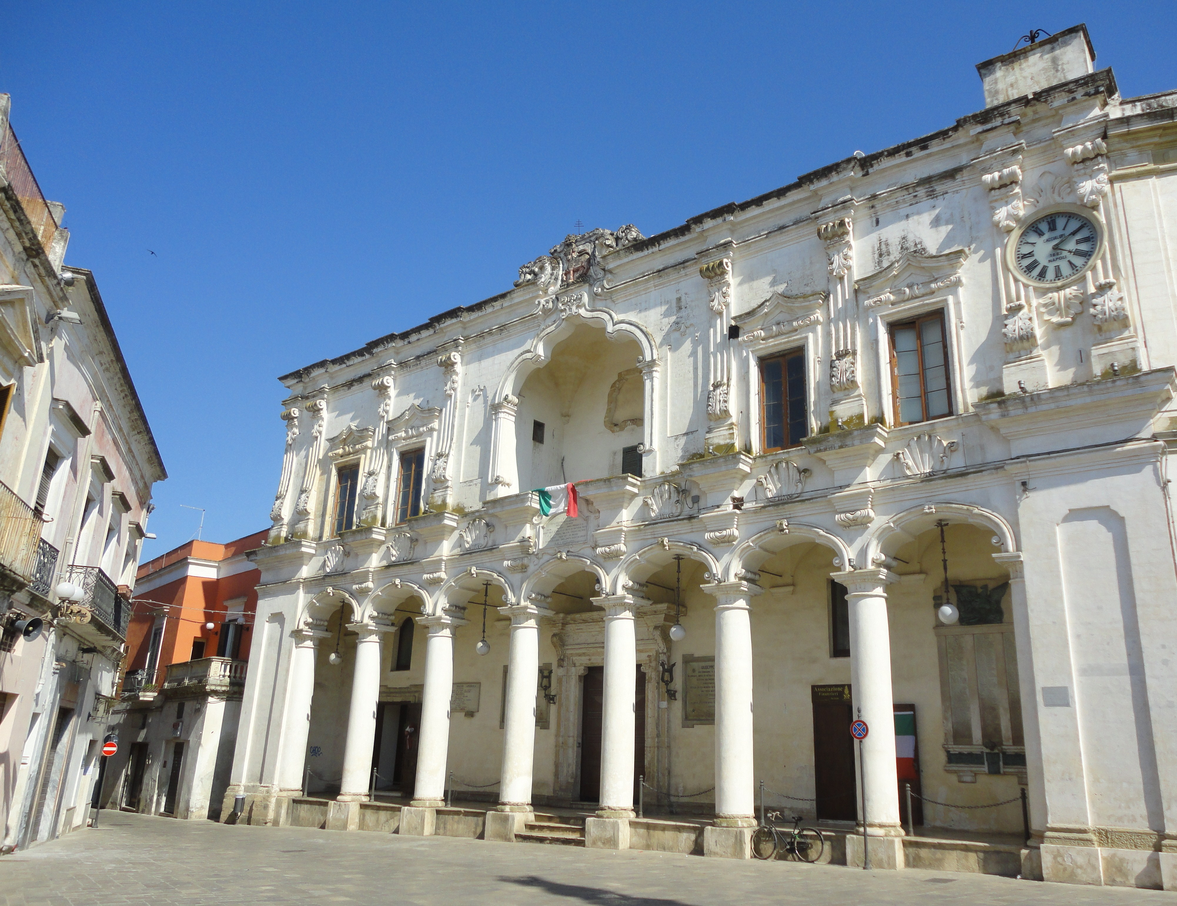 Palazzo dell'Università a Nardò, Lecce